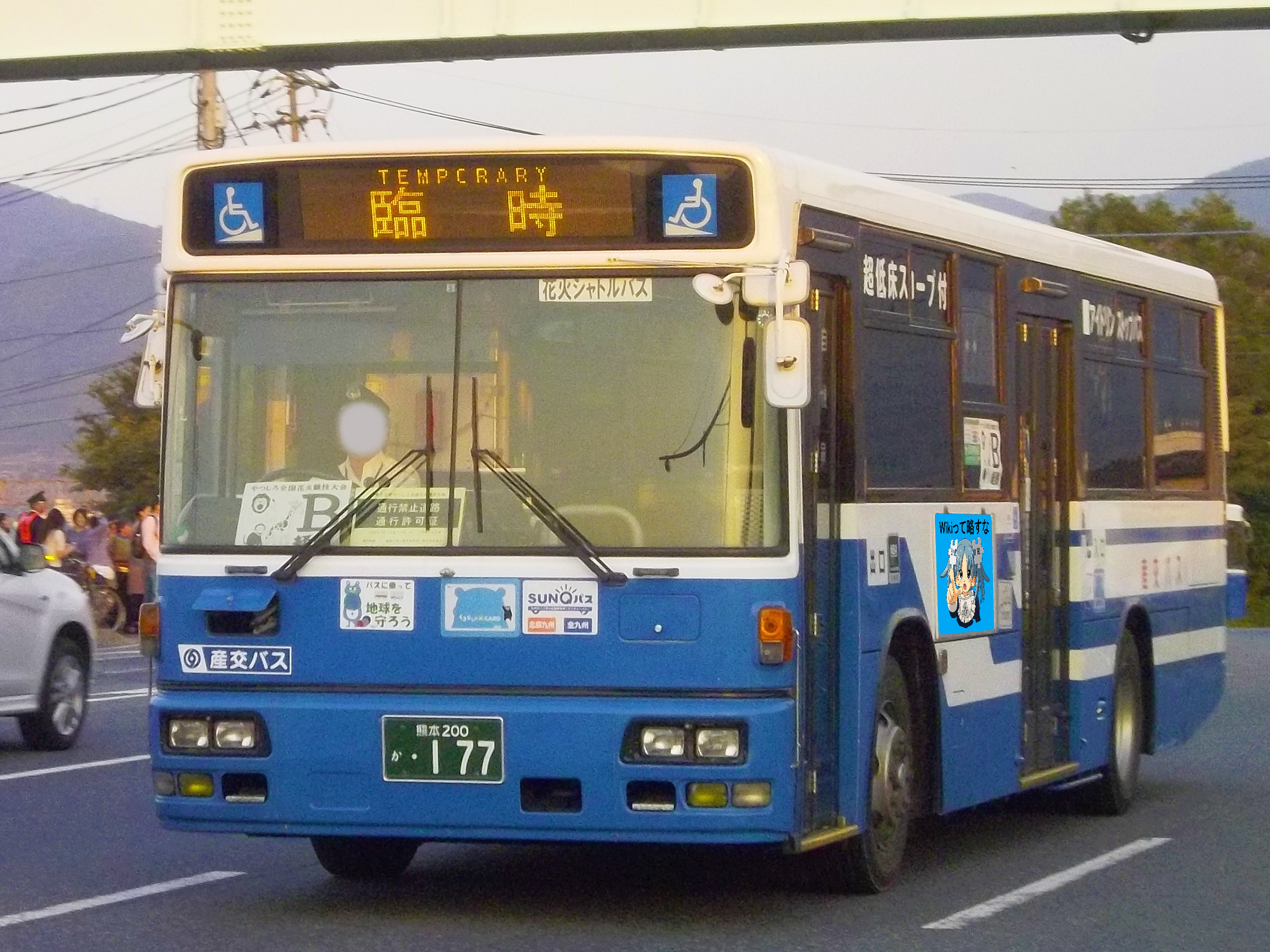 九州産交バスの日野・ブルーリボン、西日本車体96MC架装車